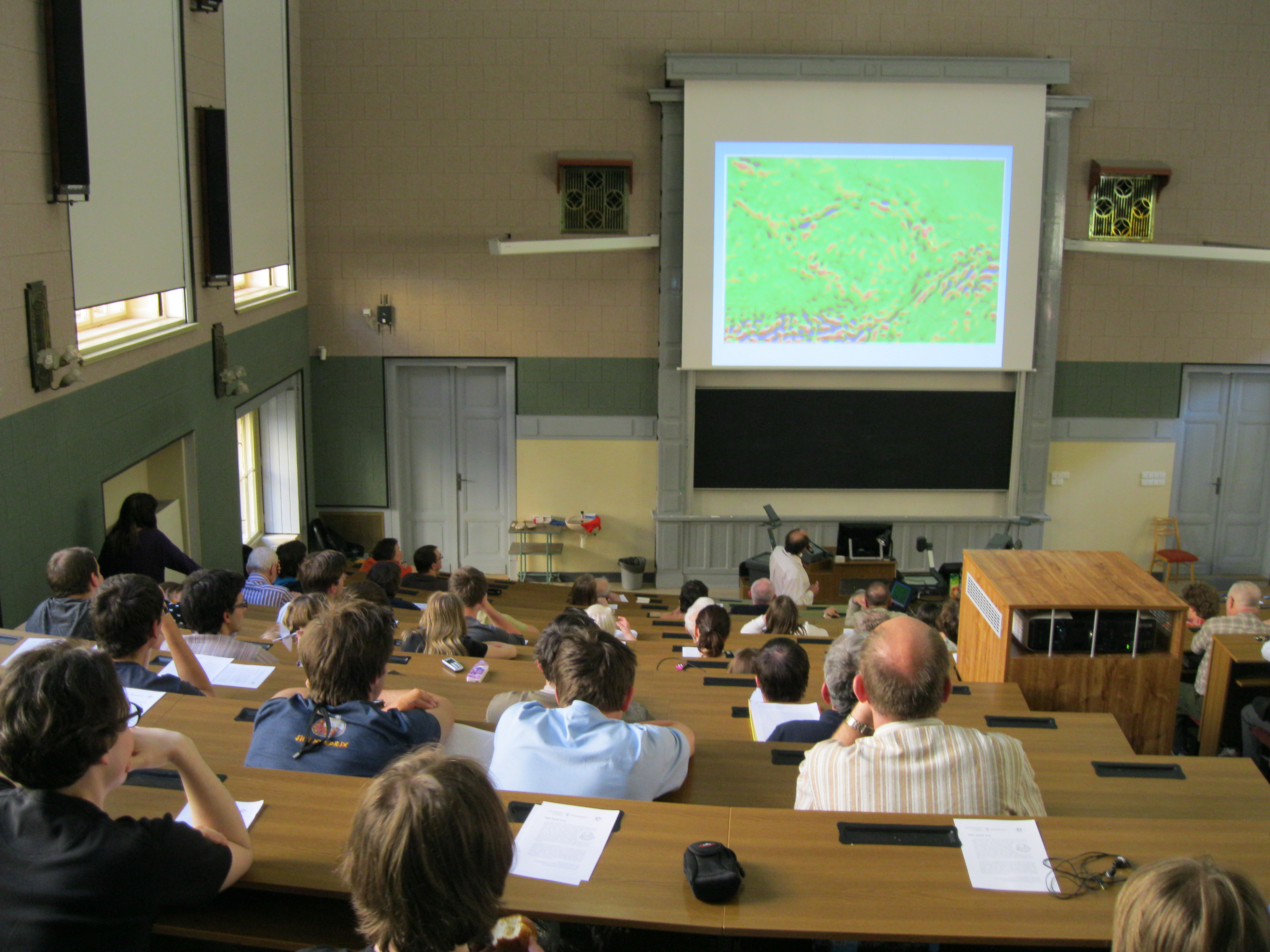 Přednáška Dr. Petra Rajlicha ke Dni Země 2013 na Přírodovědecké fakultě Univerzity Karlovy v Praze.